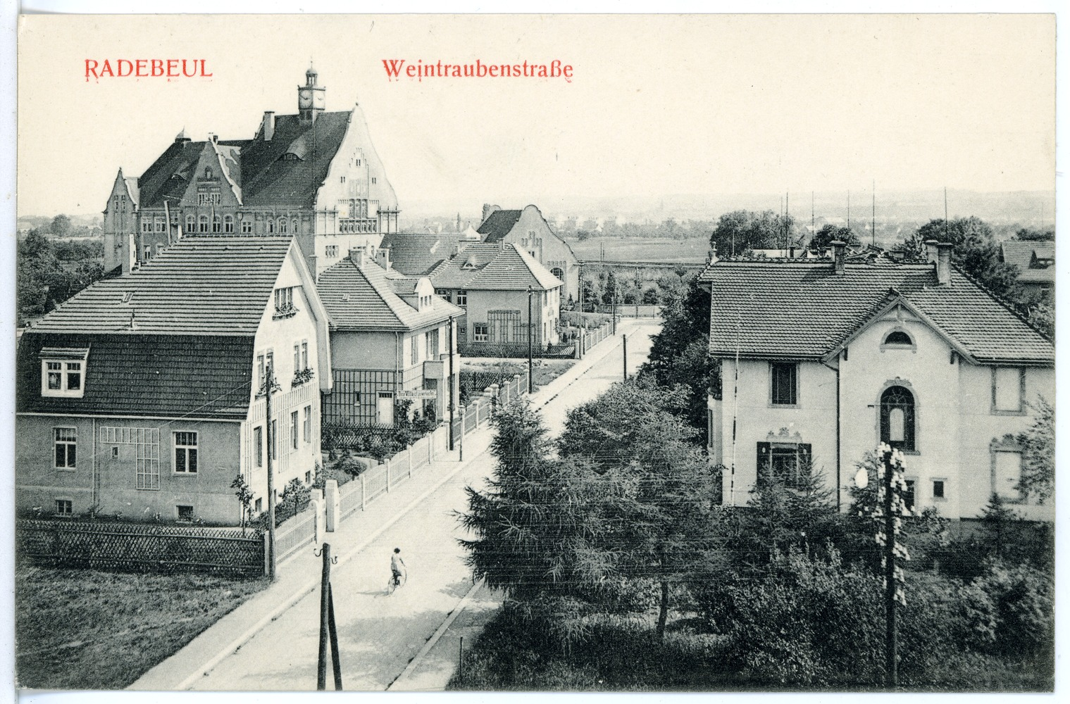 Radebeul; Weintraubenstraße This postcard is from publisher Brück & Sohn in Meißen ( postcard has a unique number 15971 and is available in a higher resolution at the publisher. This images was uploaded in a cooperation project between Wikipedians and the publisher.